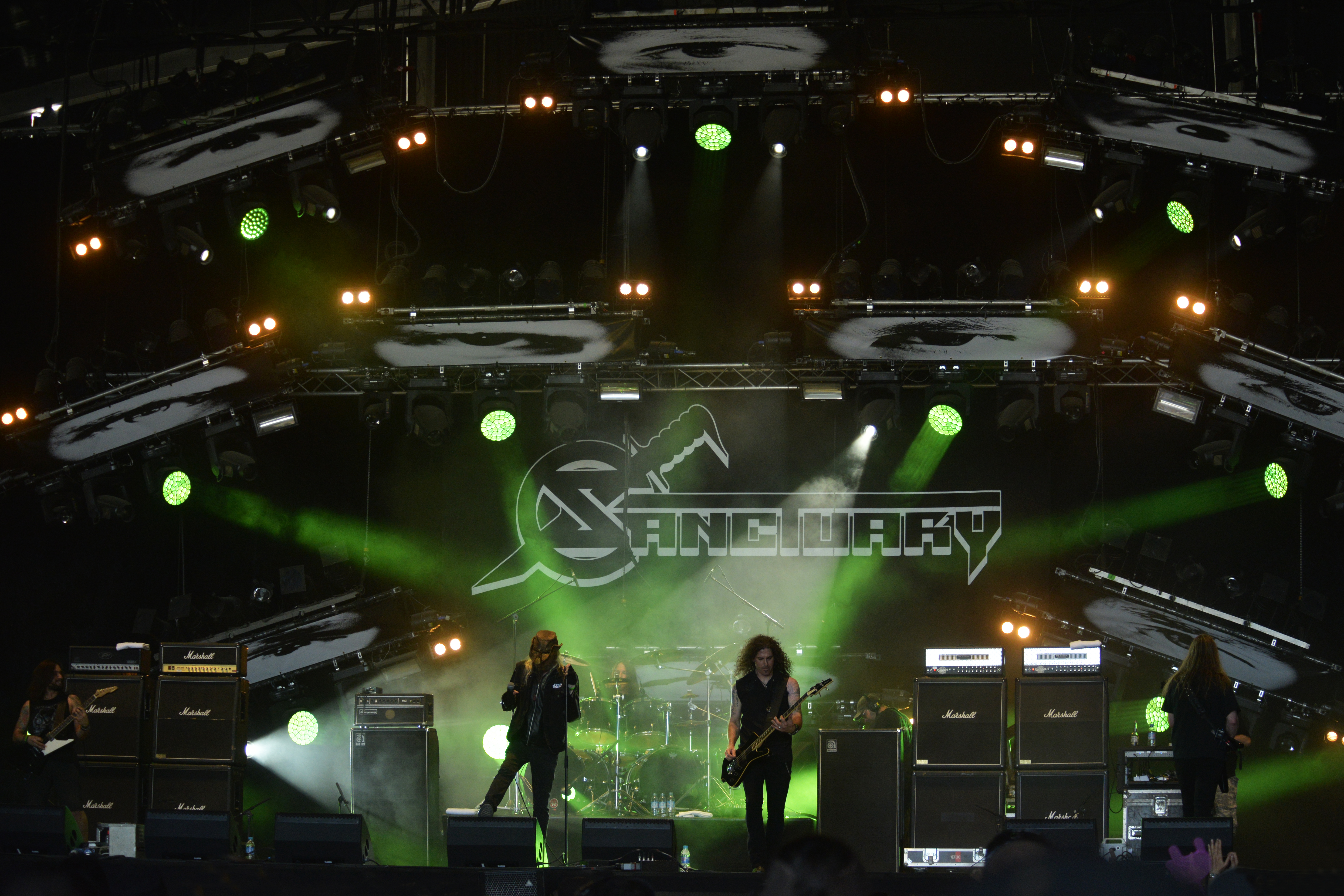 Concert du groupe de métal américain Sanctuary au Hellfest 2017.